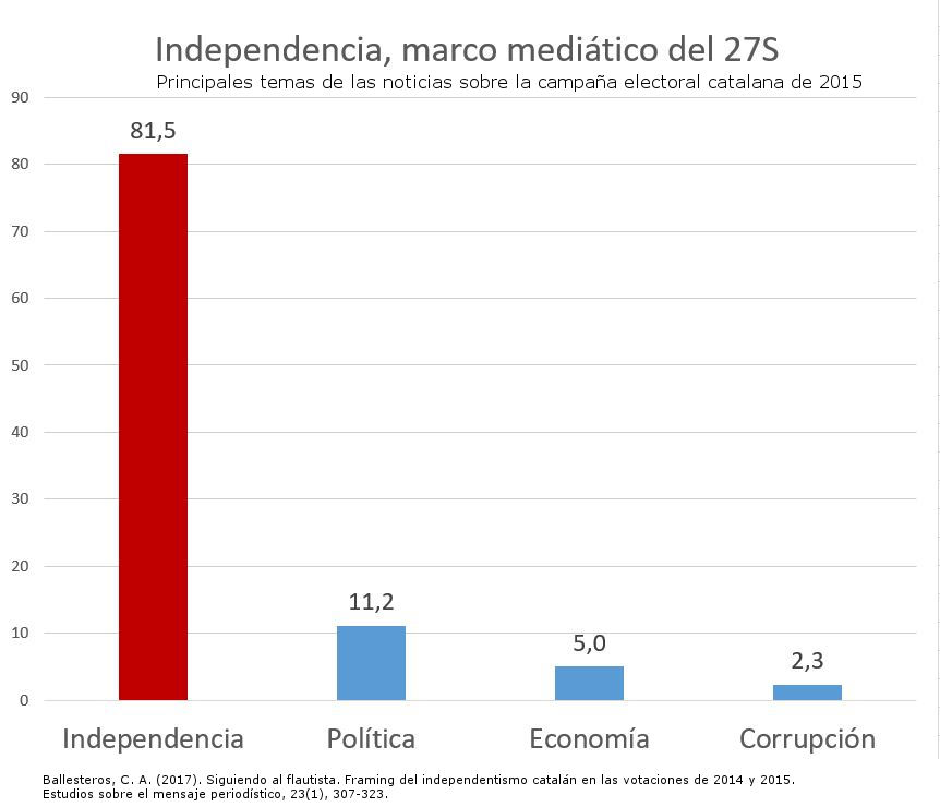 La independencia fue el principal tema informativo en las Elecciones Autonómicas de Cataluña 2015